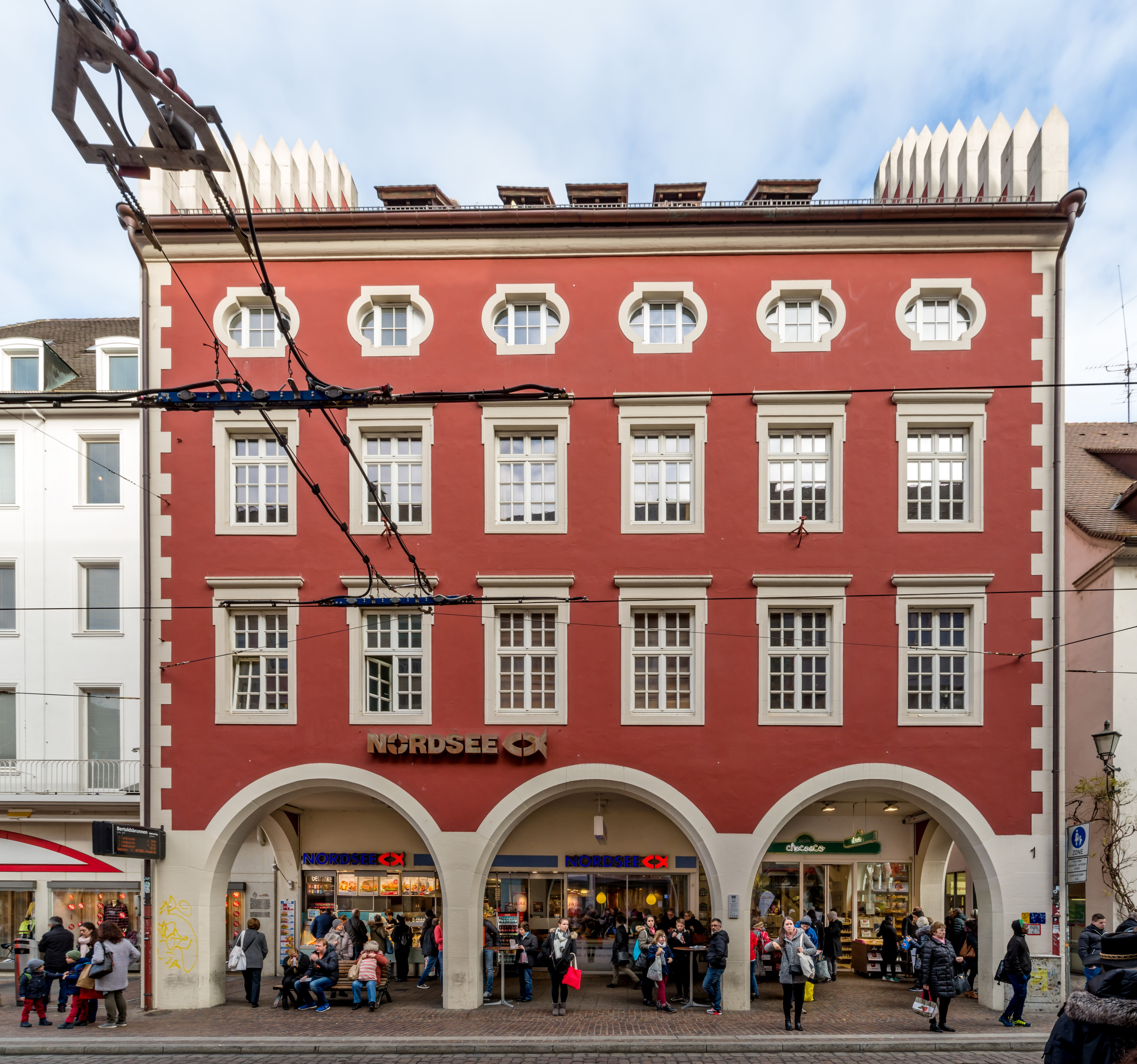 Bilder aus Freiburg